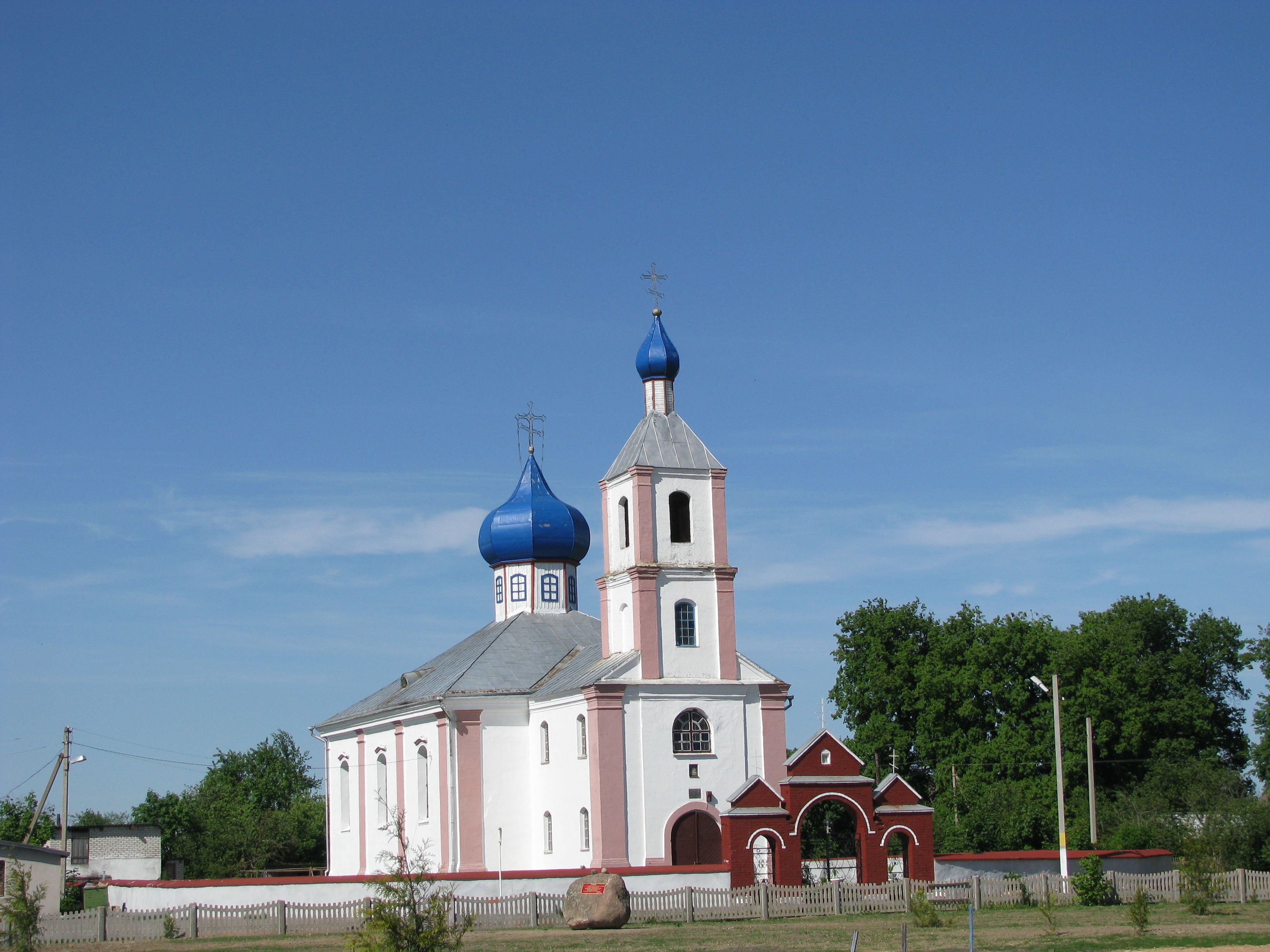 Беларуская (тарашкевіца): Царква Раства Багародзіцы. в. Лужкі This is a photo of Belarusian heritage monument. Reference number: 213Г000842 ( WLM)